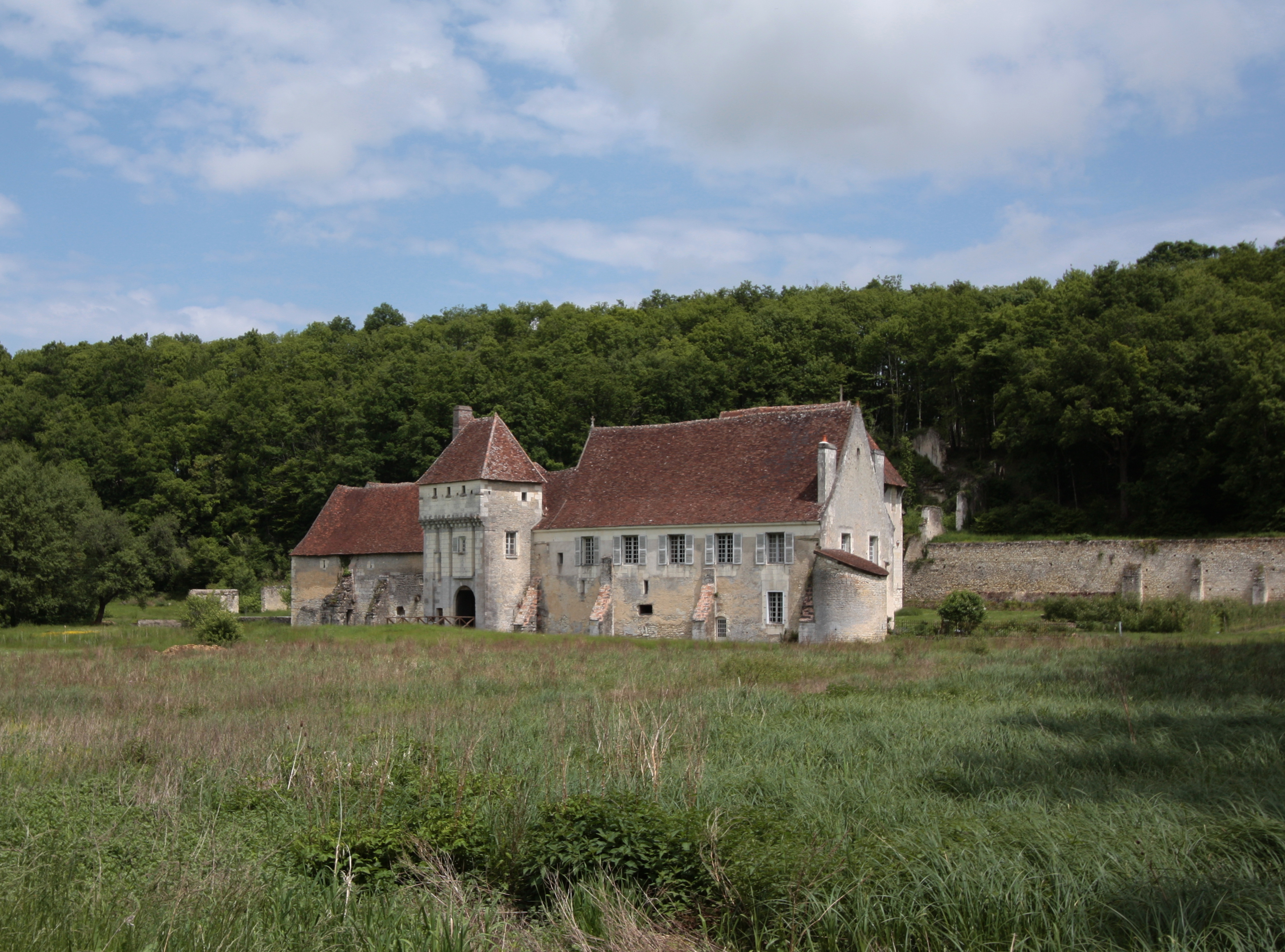 Ehemaliges Kartäuserklosters Chartreuse Saint-Jean du Liget in der französischen Gemeinde Chemillé-sur-Indrois im Département Indre-et-Loire - Der mittelalterliche Bauernhof La Corroierie gehörte zum Kloster.